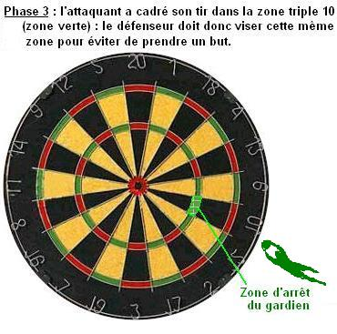 Footballdarts - phase 3